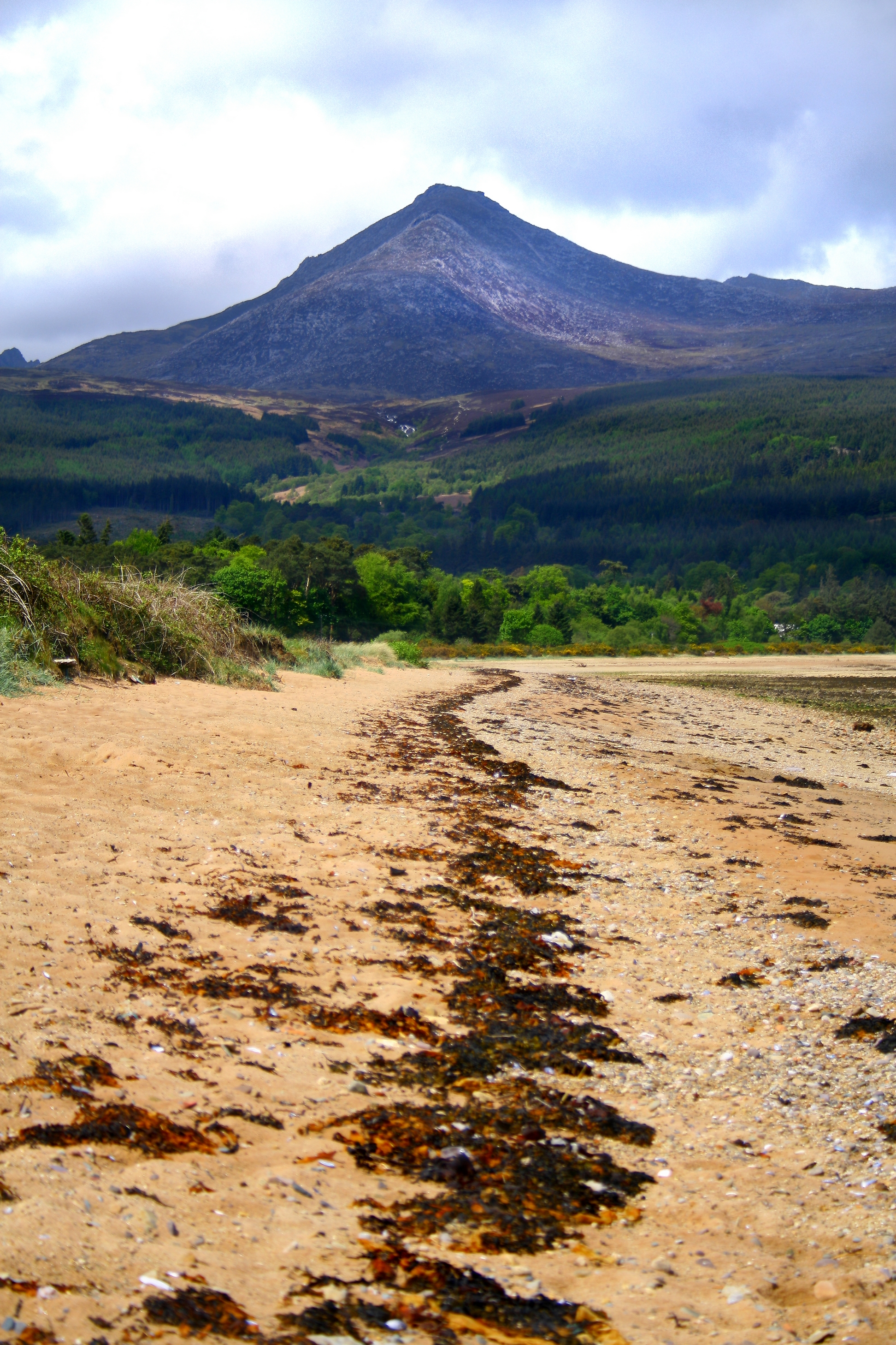 Brodick Tideline